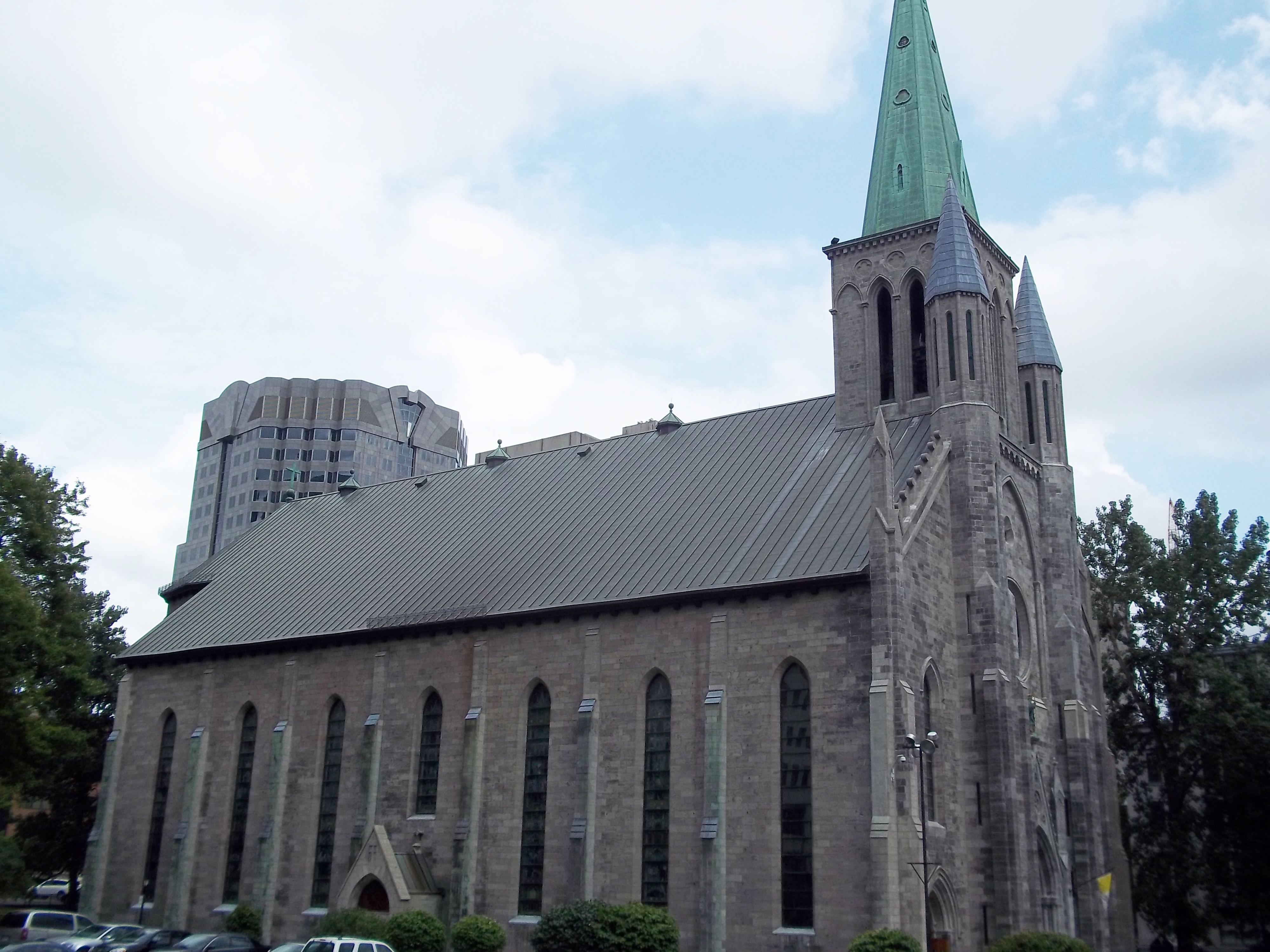 Basilique Saint Patrick, Montréal (info)